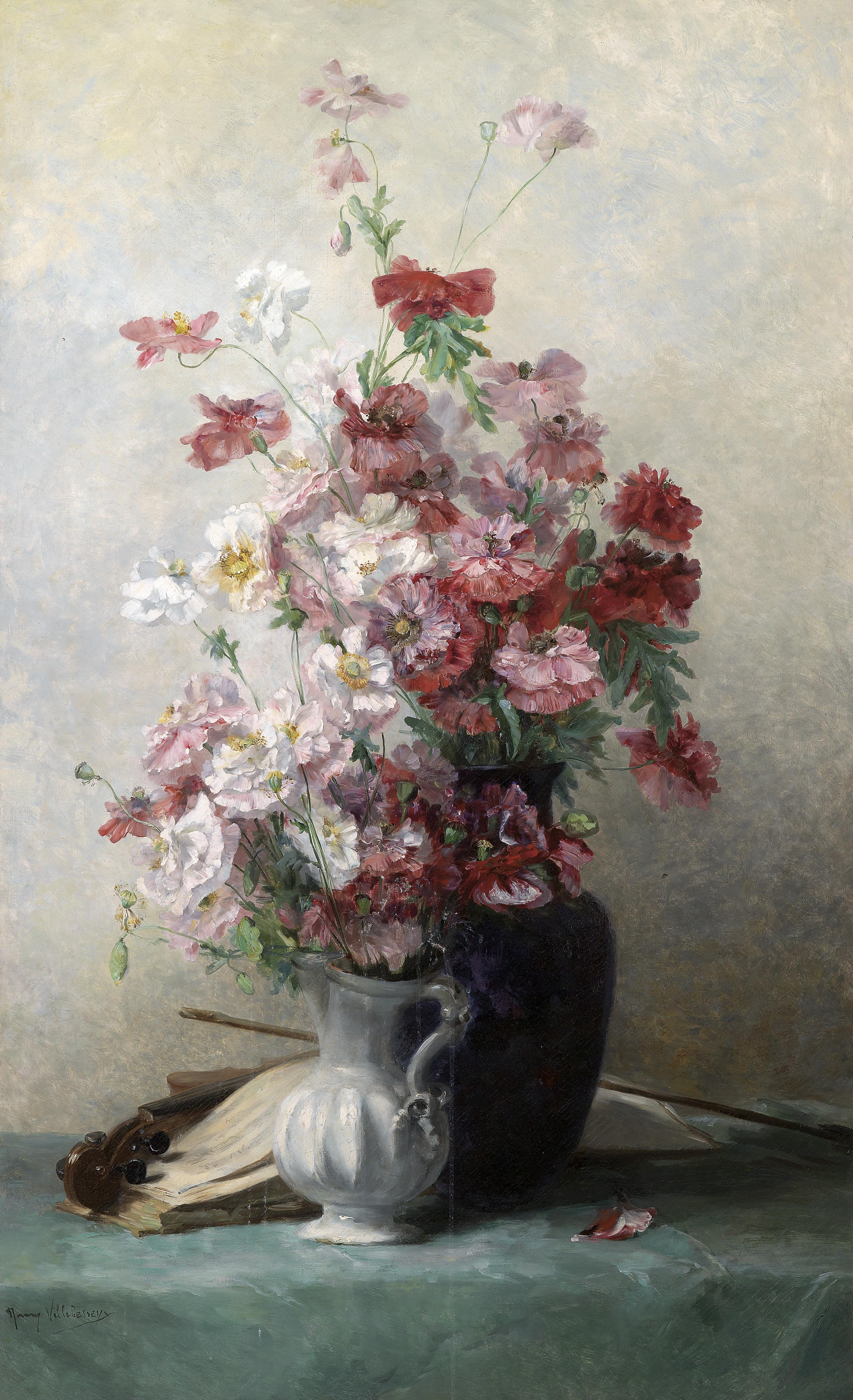 Mohnblumen in Vase, signiert Jenny Villebesseyx, Öl auf Leinwand, 130 x 80 cm